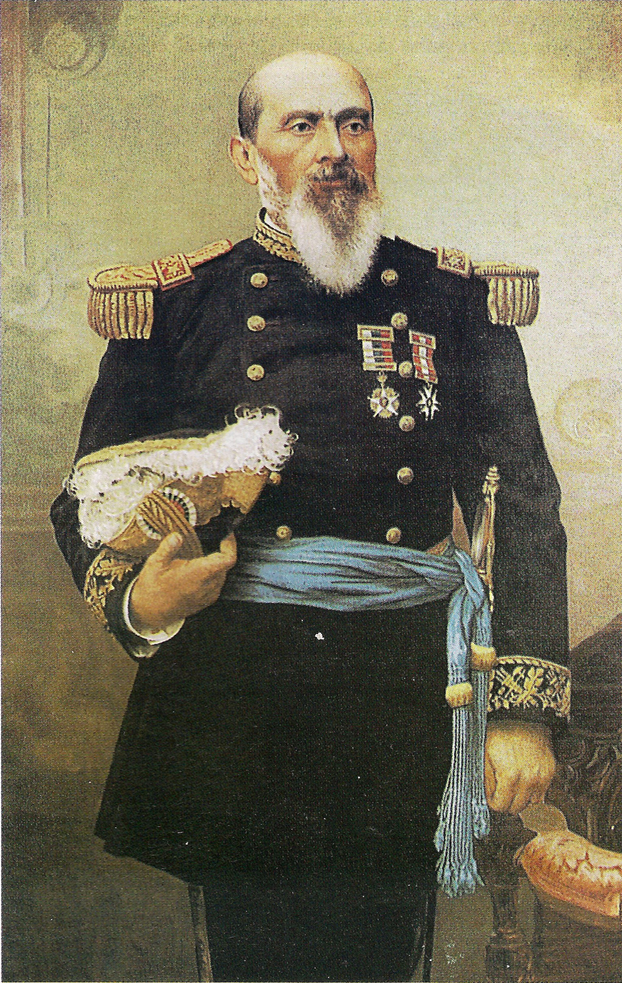 Orozimbo Barbosa Puga (* Chillán, Región del Biobío, Chile 1838 - † Placilla (Valparaíso), Región de Valparaíso, Chile 28 de agosto de 1891) fue un militar chileno, de destacada participación en las campañas de reconquista de la Araucanía, la Guerra del Pacífico y la revolución de 1891.